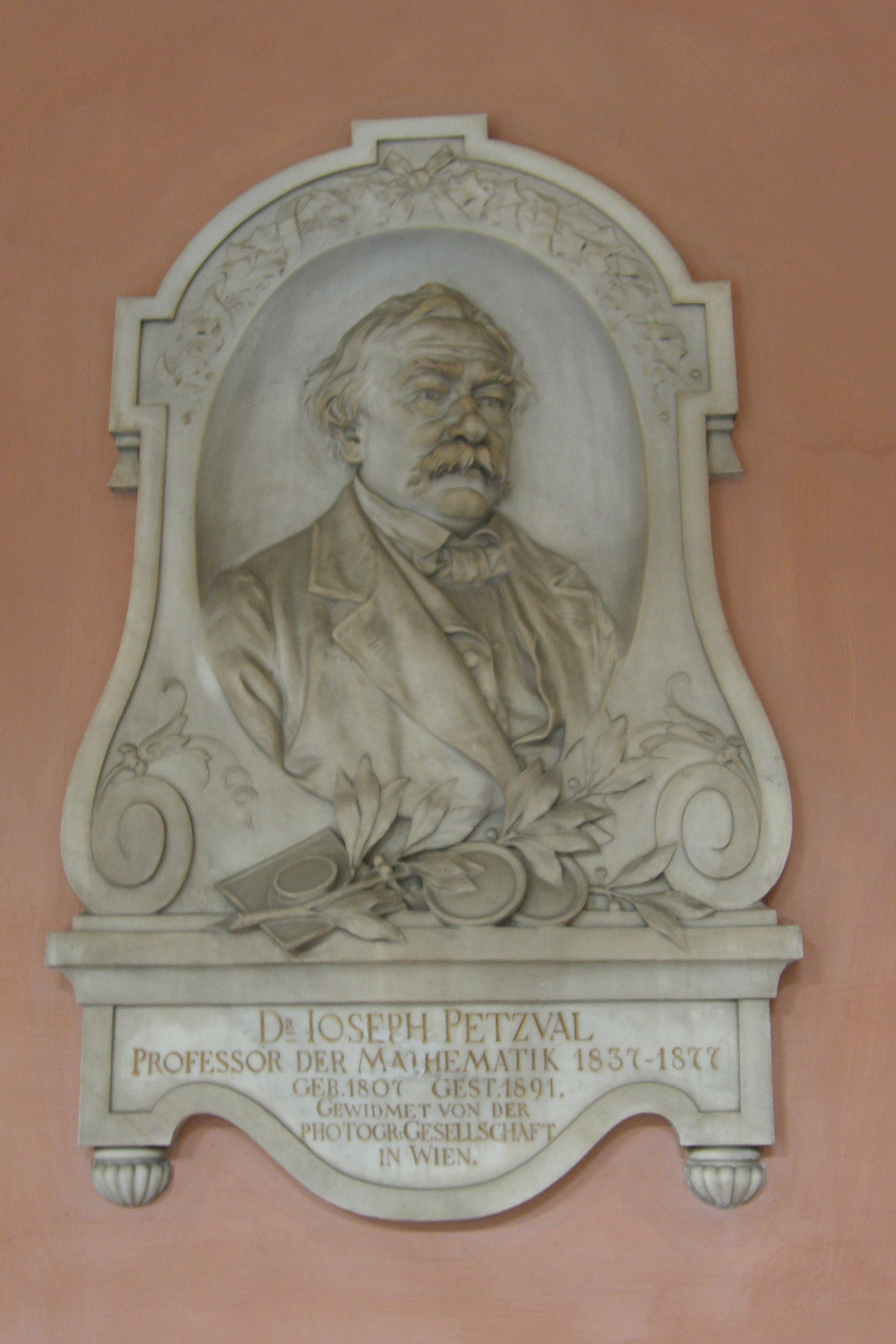 Pamětní deska Jozefa Petzvala na vídeňské univerzitě